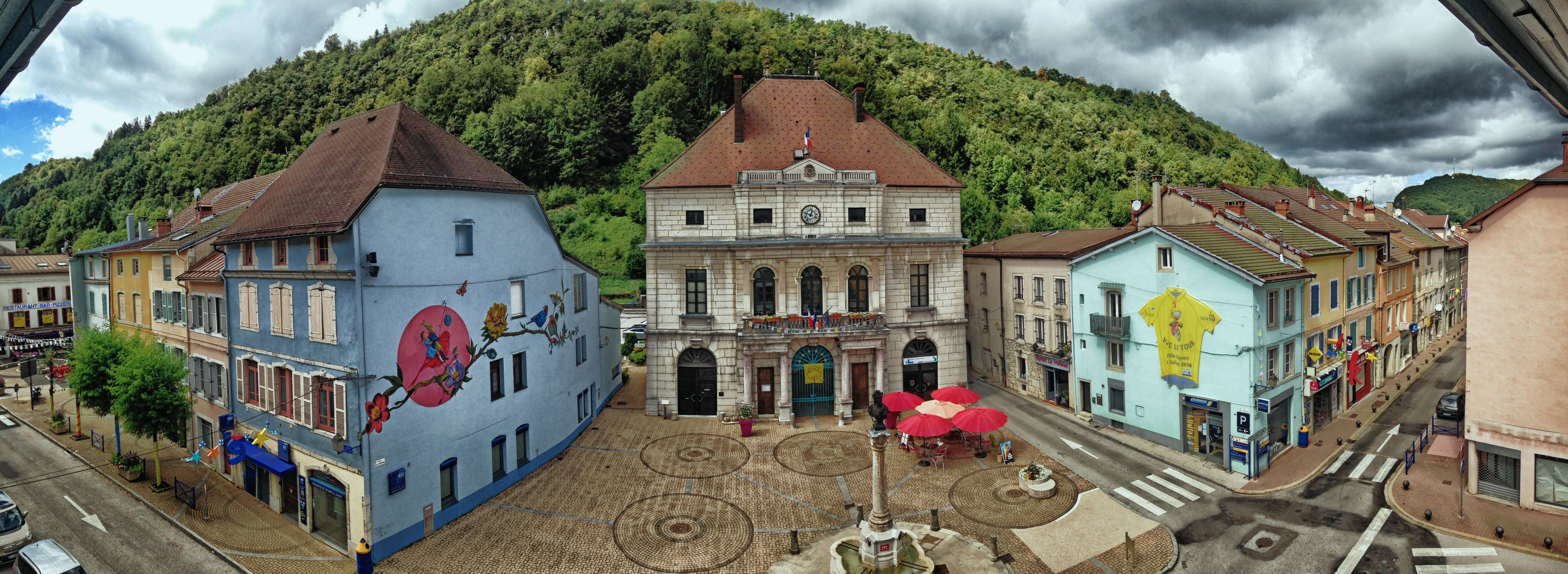 Panoramique de la place de la mairie et de la rue Pasteur. A 2 pas du cinéma et du musée international du jouet